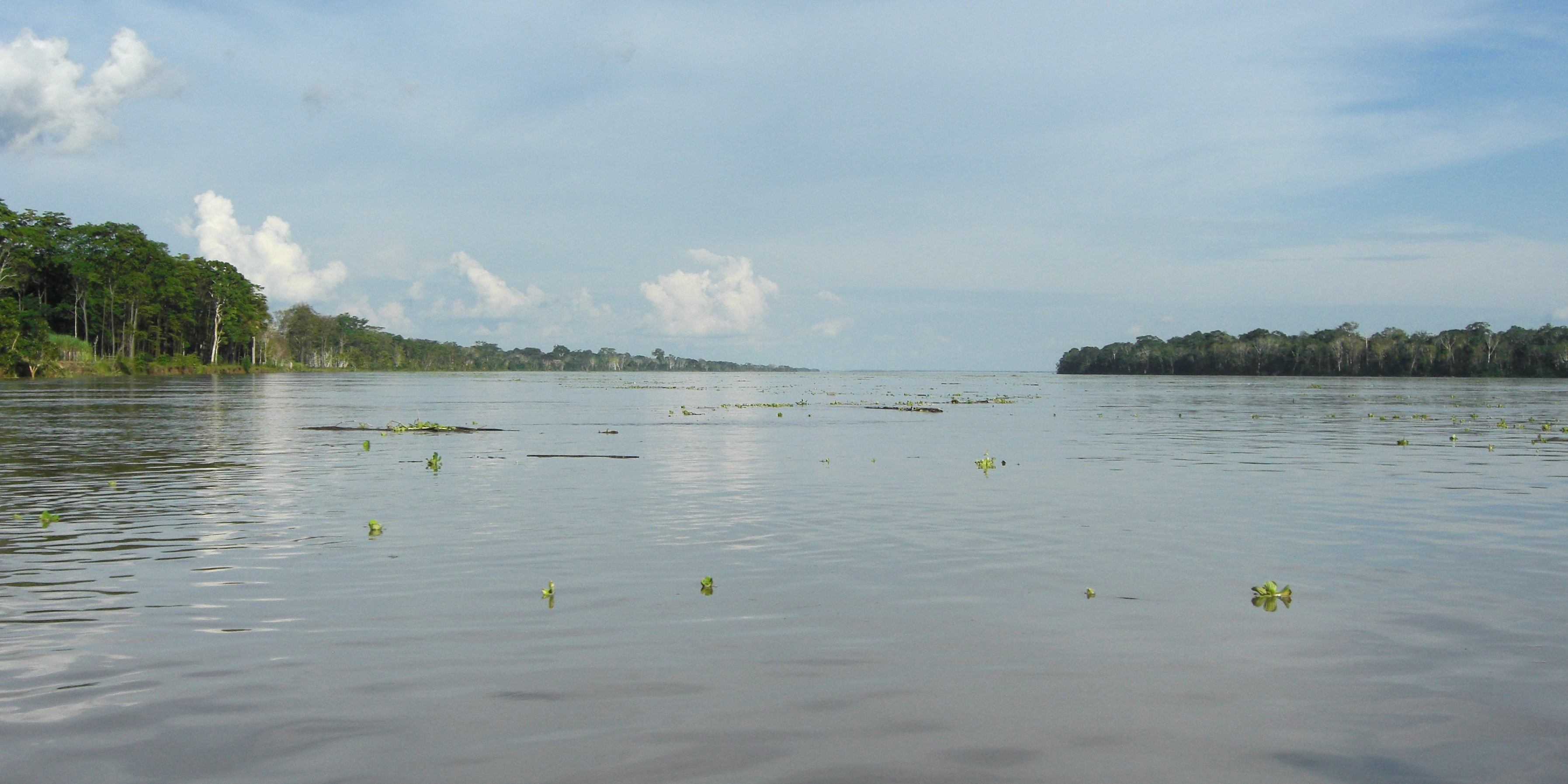 Amazon River, near Indiana, Peru, 20130114